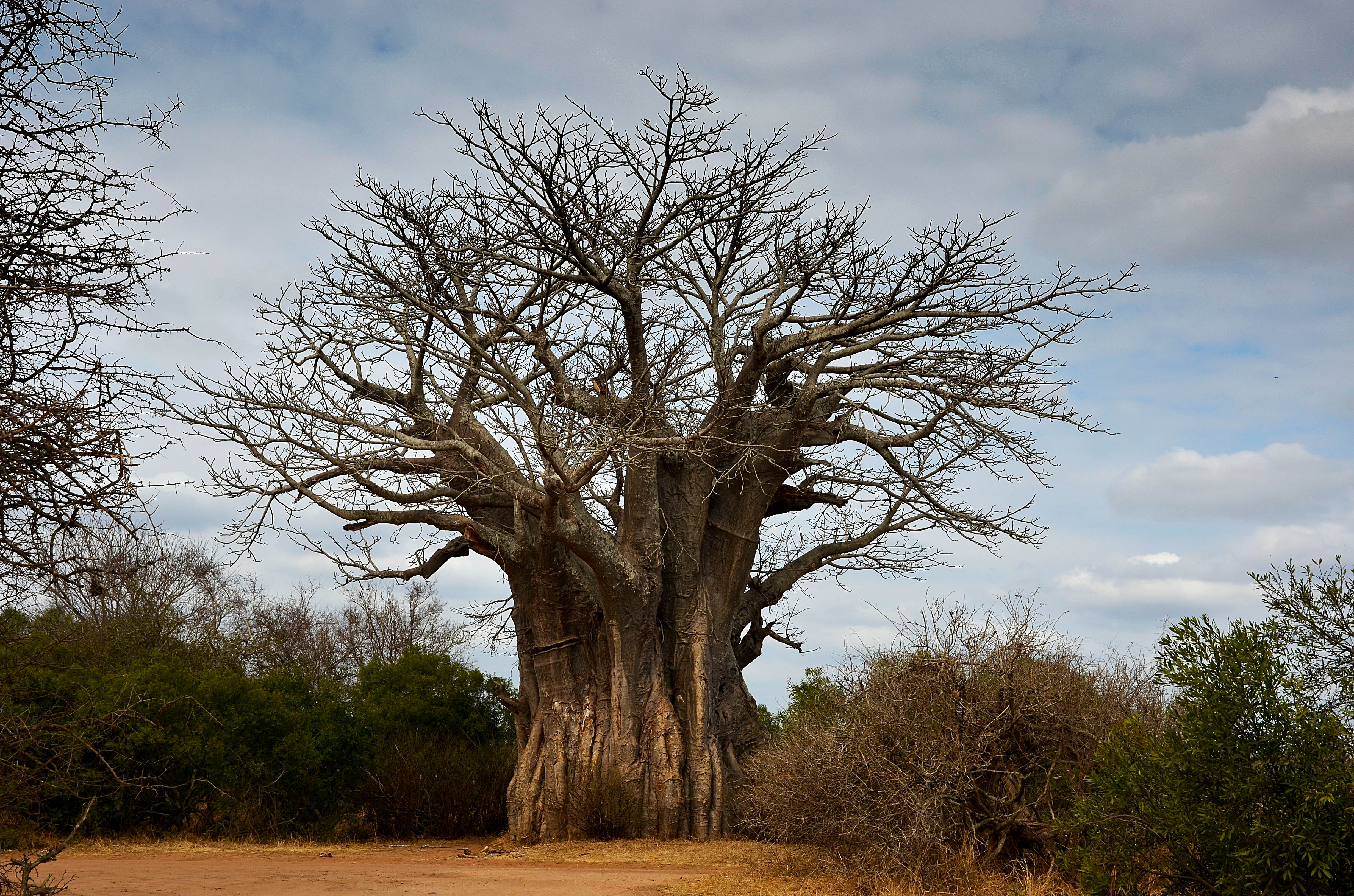 Strom Baobab tree - Krugerův park